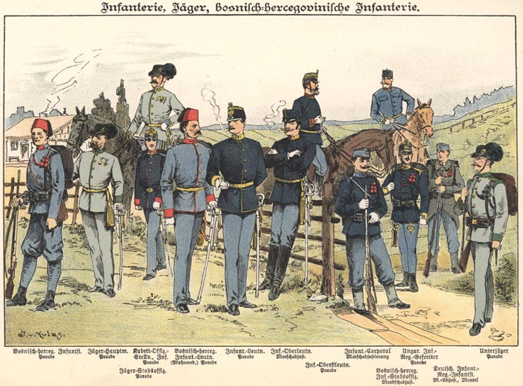 K und K Galiziesches Infanterie